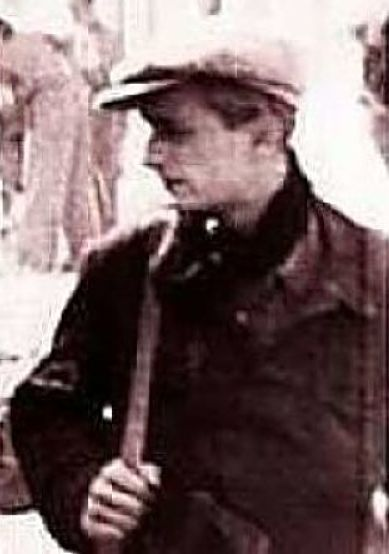 Groupe international de la colonne Durruti à Siétamo en septembre 1936 : Charles RIDEL/Louis MERCIER VEGA à sa gauche avec une casquette.